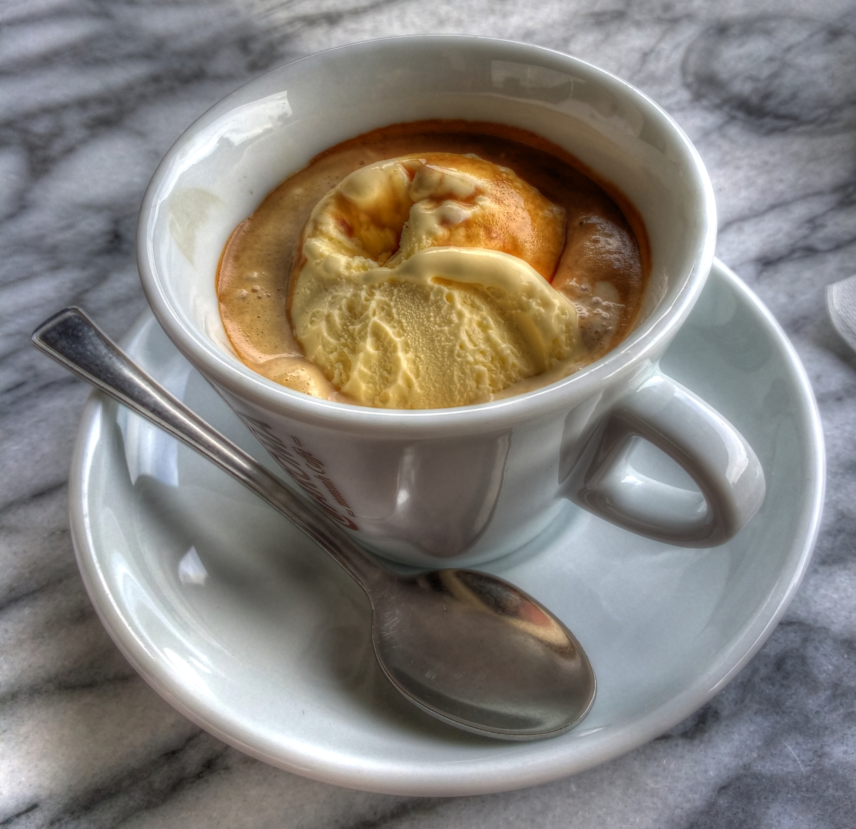 Affogato al Caffee, ein Espresso mit einer Vanilleeiskugel